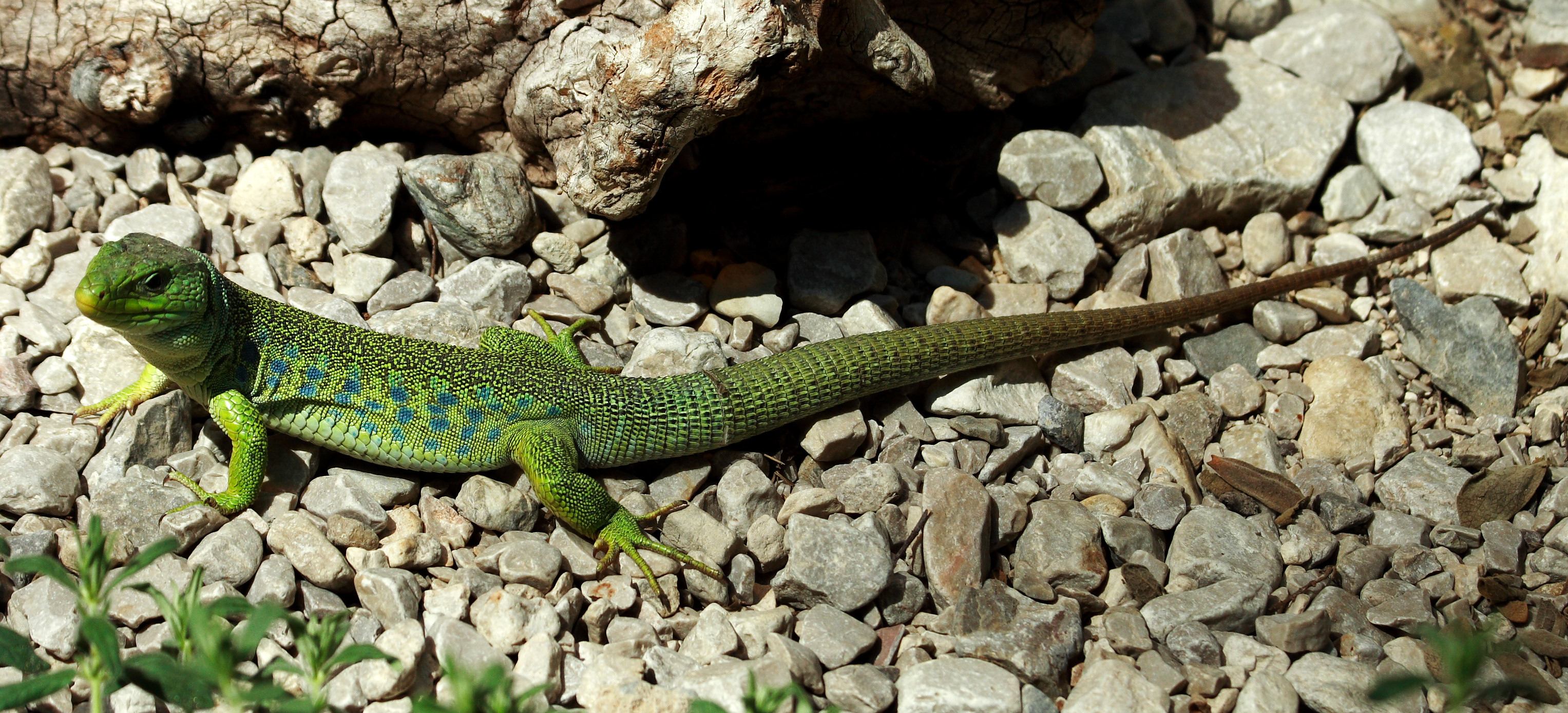 Timon lepidus (Perleidechse), Taken at the zoo Insbruck